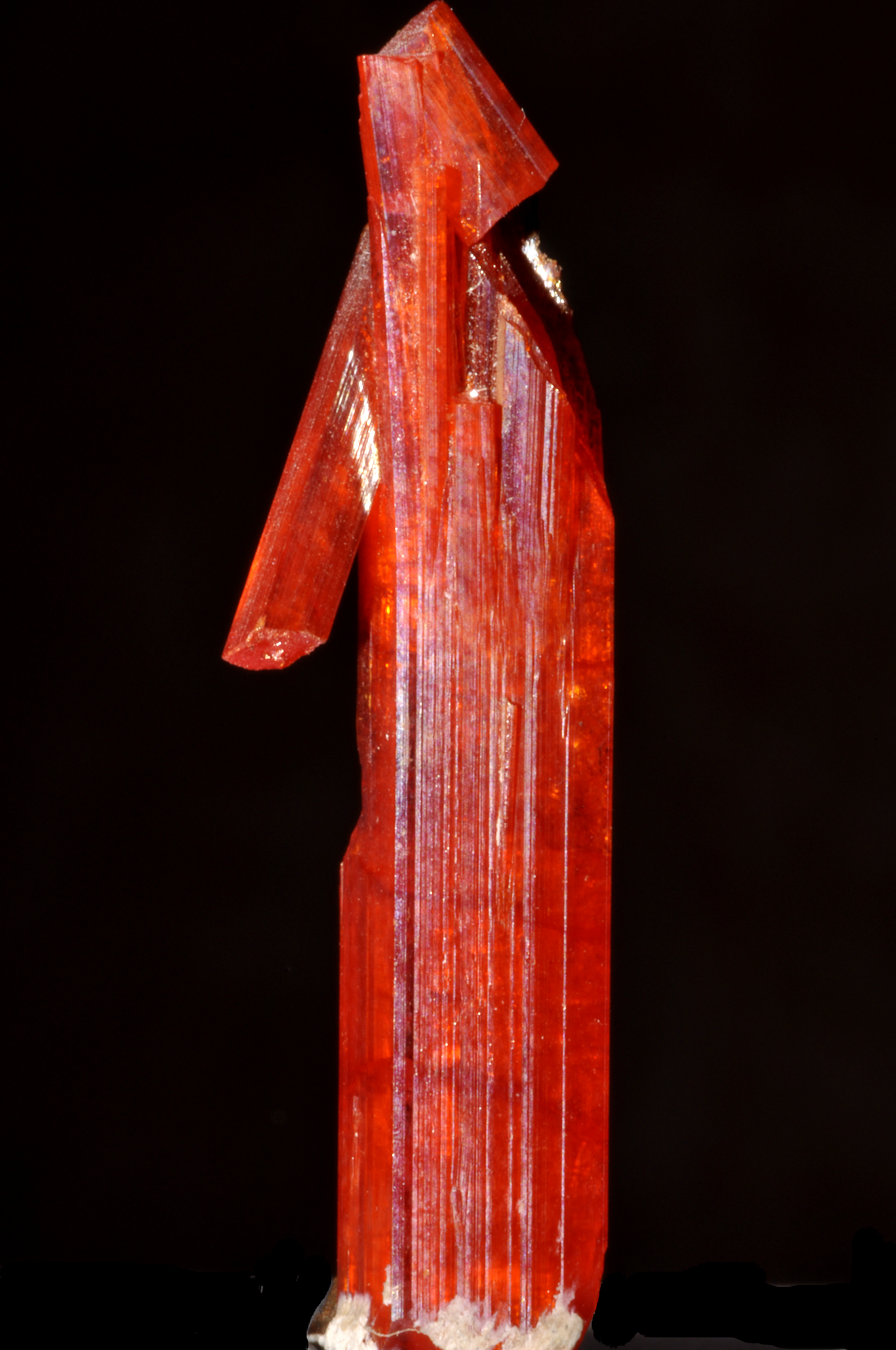 Cristaux de Crocoïte